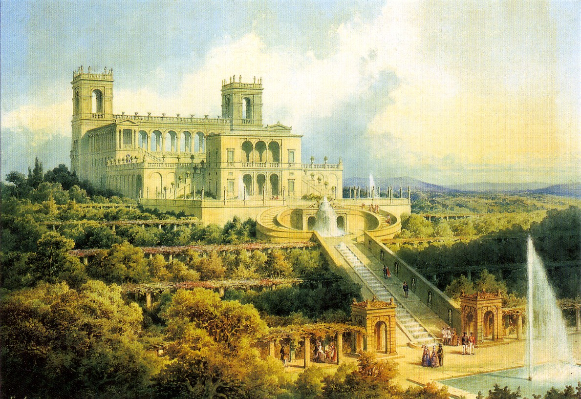 Das Belvedere auf dem Pfingstberg in Potsdam. Projekt zum Neubau